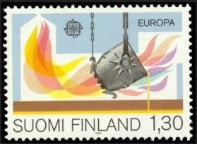 Description